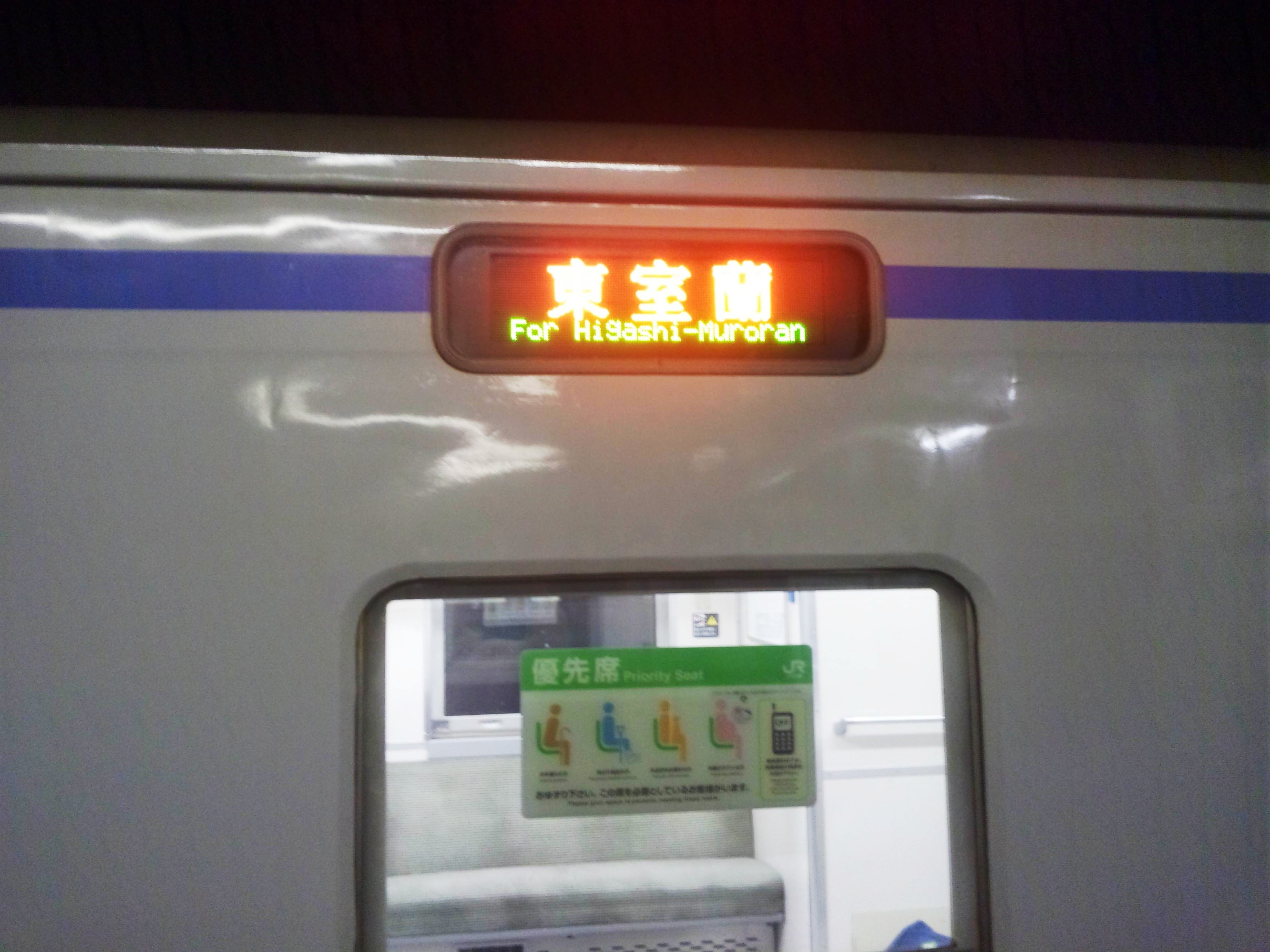 苗穂工場でワンマン運転対応工事実施、完了済み後の営業運転中の様子。JR北海道の普通ワンマン気動車では初の行先方向表示器にLEDを採用している。